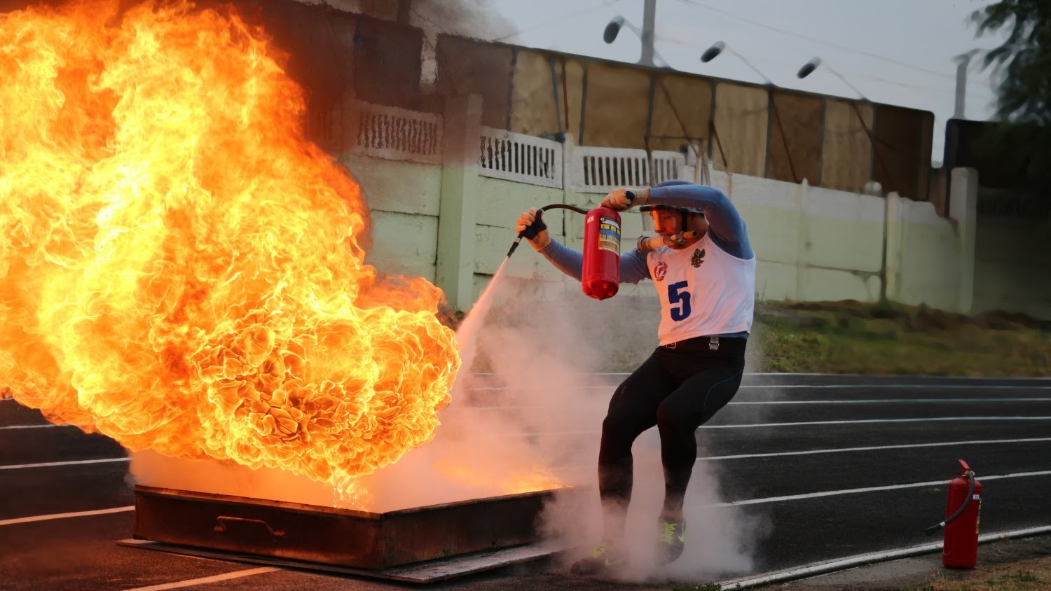 Участник 4-го этапа пожарная эстафеты тушит горящую жидкость на IV Чемпионате Федерального агентства железнодорожного транспорта по пожарно-прикладному спорту в г.Пермь.